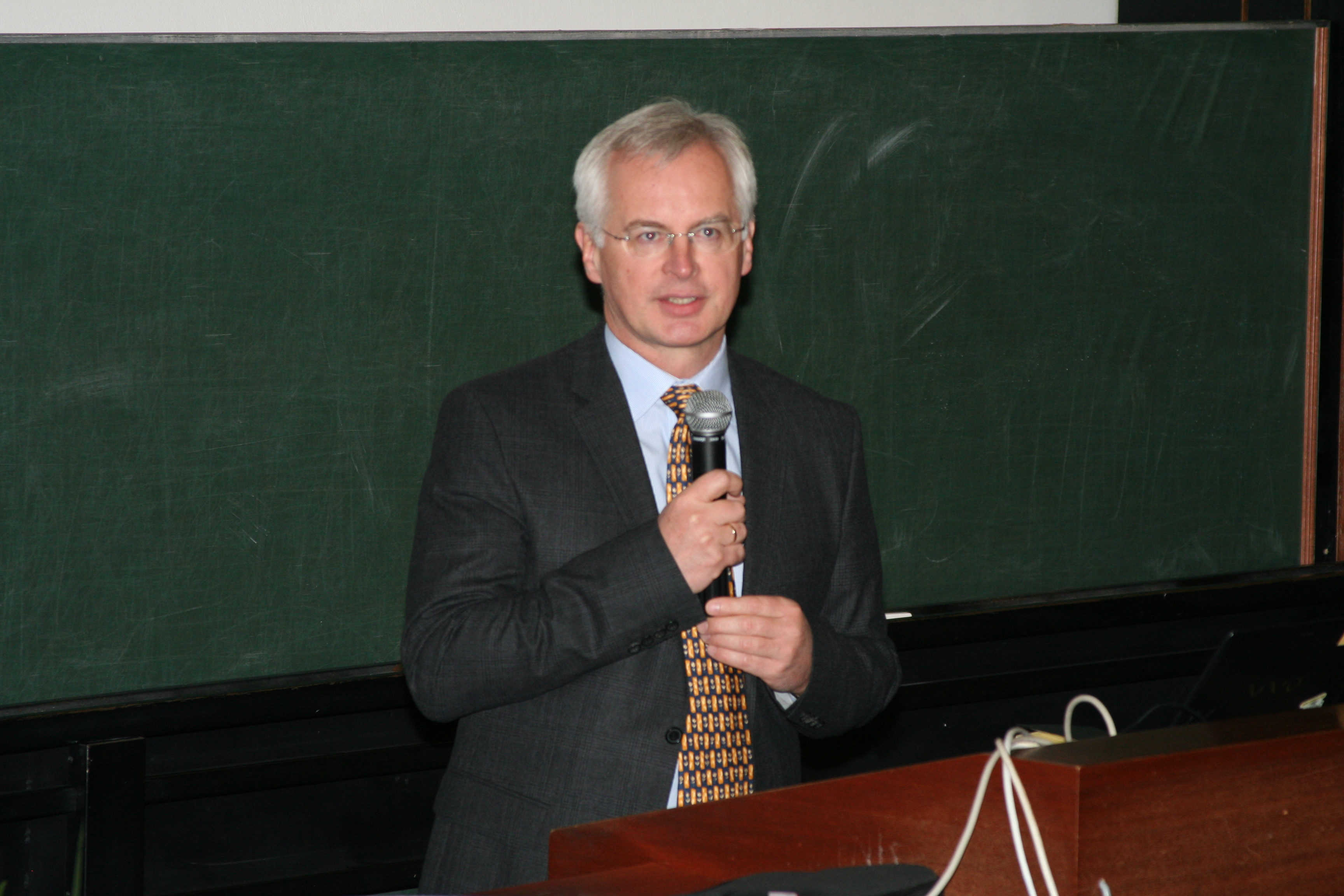 Eröffnung der Hans Groll Tagung am Universitätssportzentrum der Universität Wien